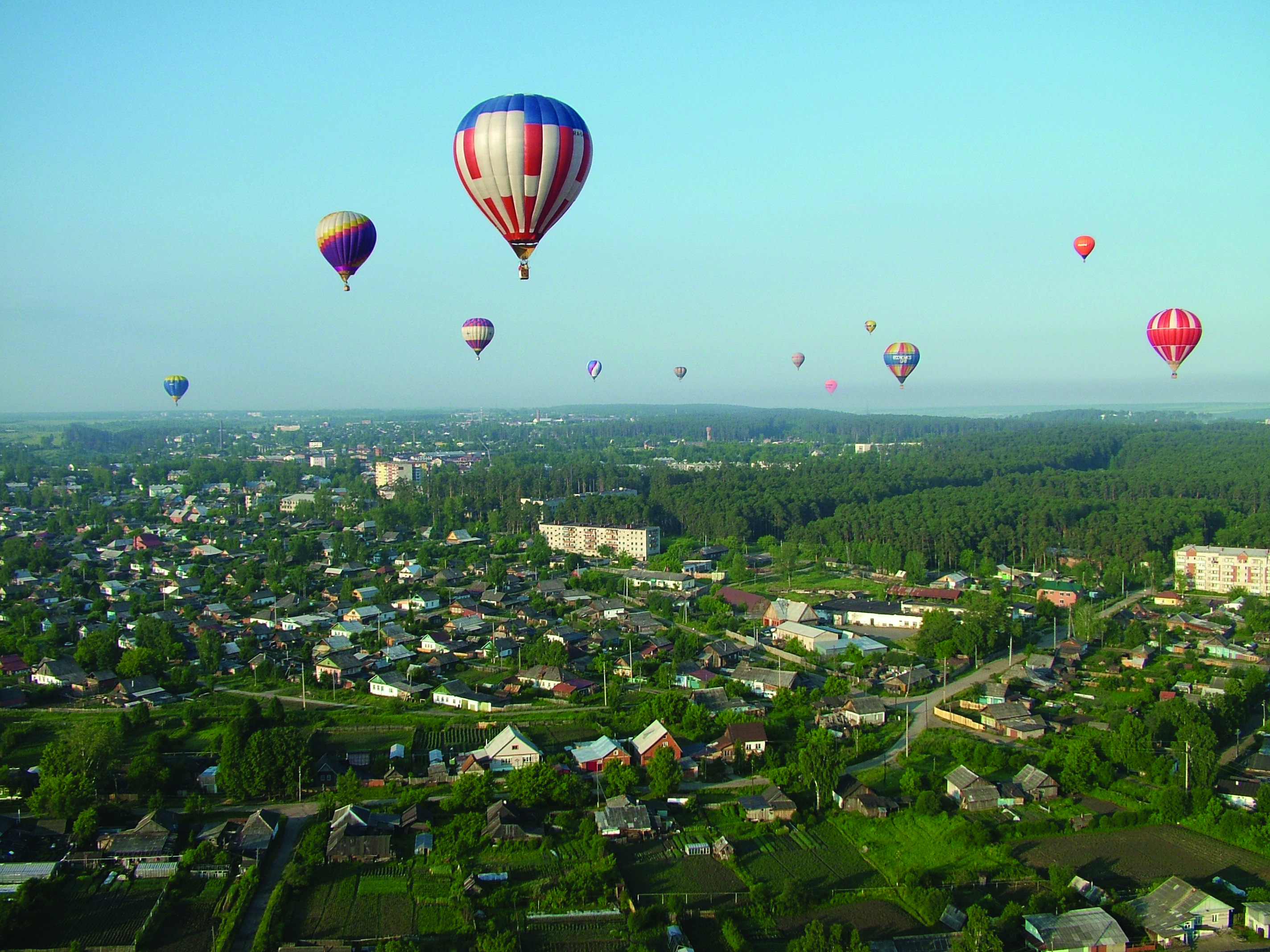 г. Кунгур. Фестиваль «Небесная ярмарка», фотография опубликована в книге Корпоративный менеджмент в Азиатско-Тихоокеанском регионе. — М.: Гном и Д, 2006. — 114 c. — ISBN 5-296-00412-4